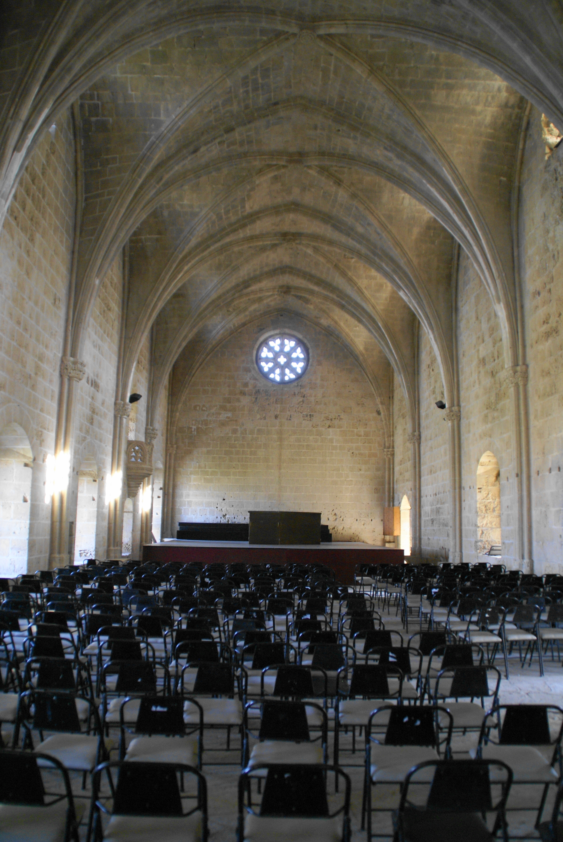 Konzertsaal in der Abtei Bellapais / Militärisch besetzte Region Nordzypern